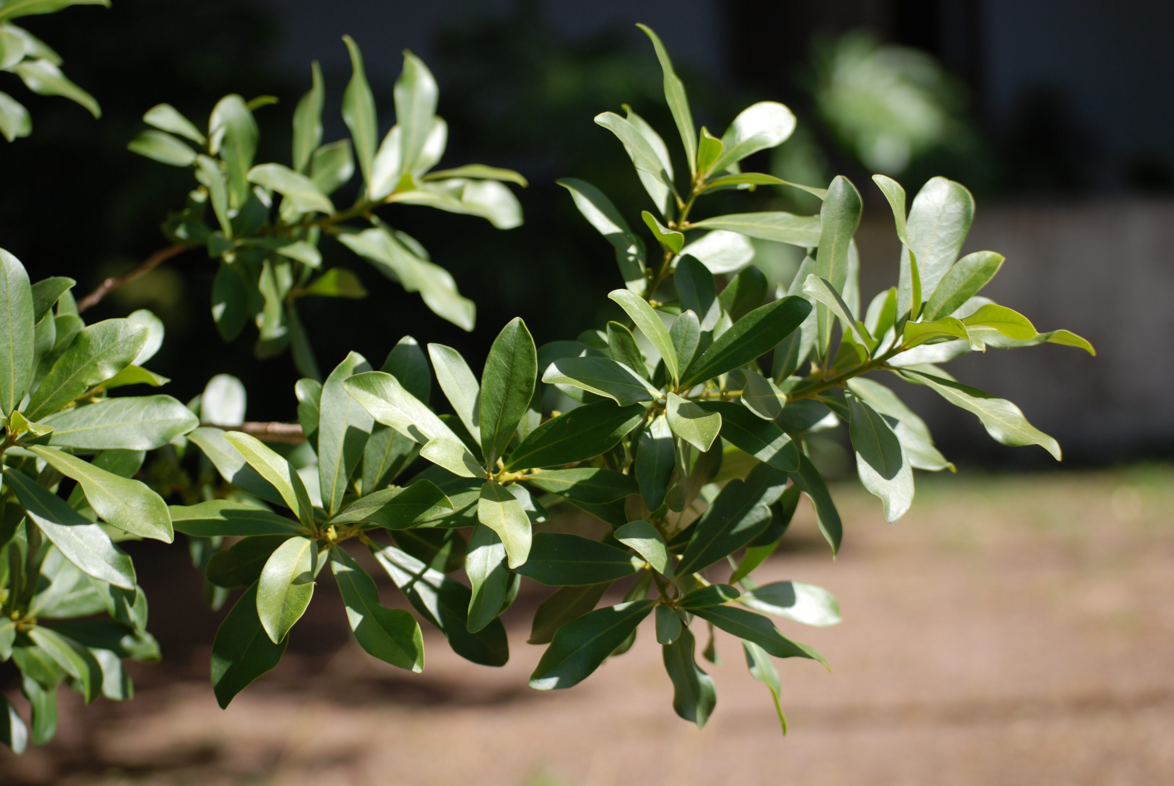 Fotografía de las hojas de la Rapanea laetevirens, ubicado en el museo de Canelones (Uruguay).